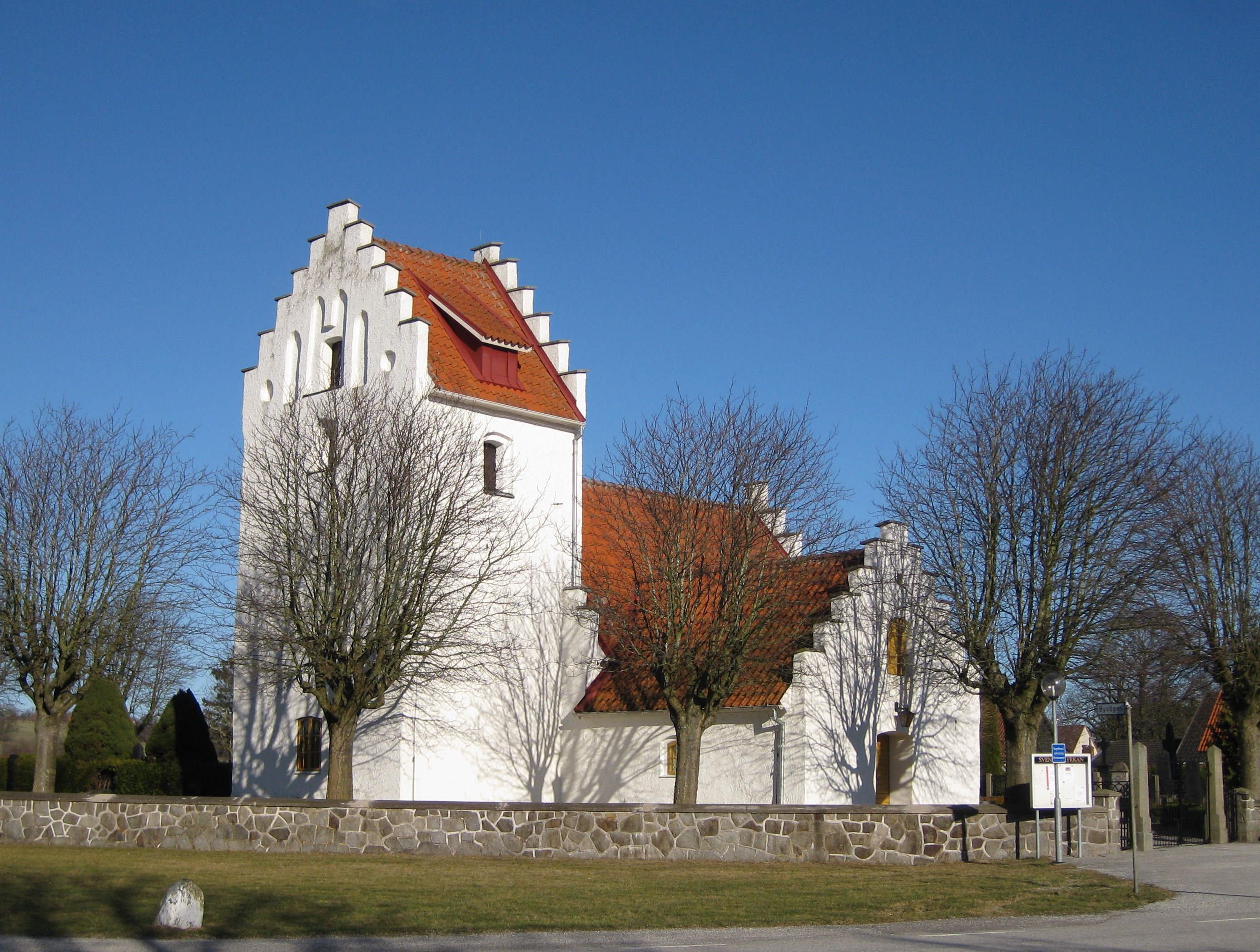 Revinge kyrka i Skåne